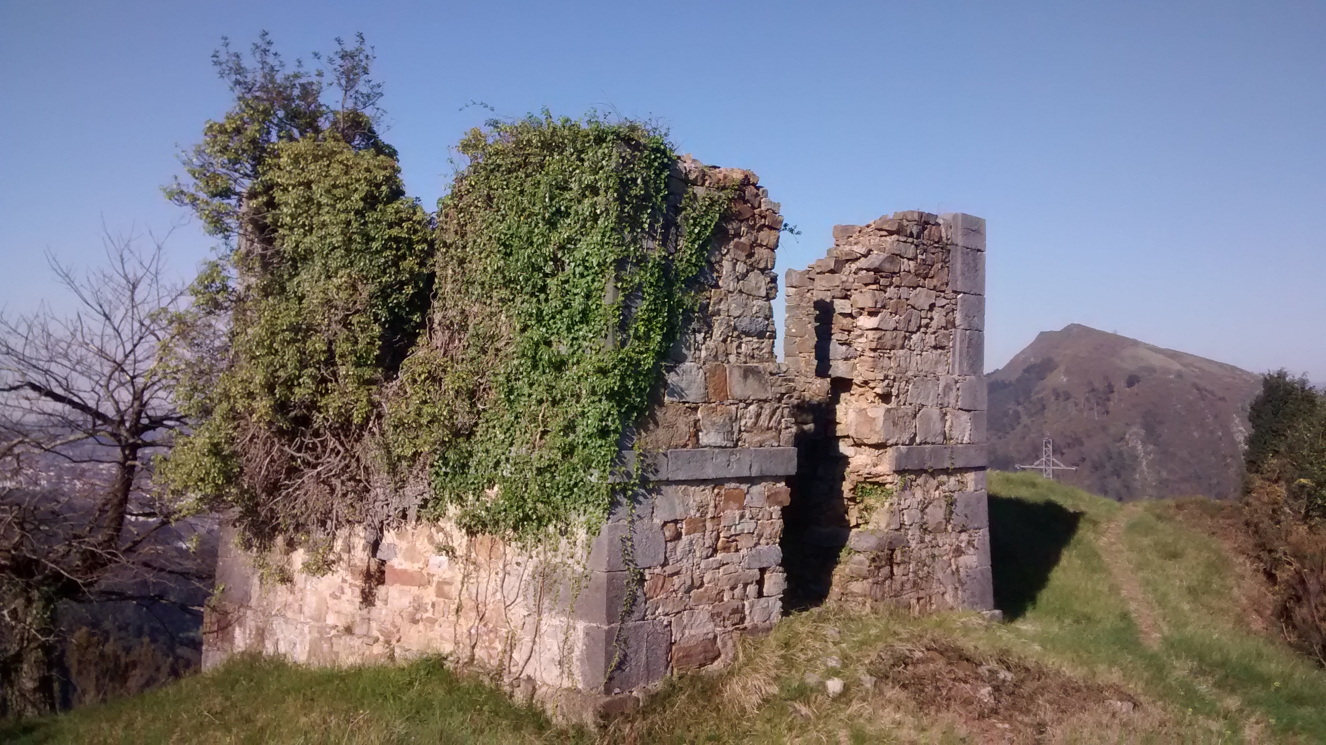 Andoaingo Aitzbeltz mendiko telegrafo optikoaren dorrea